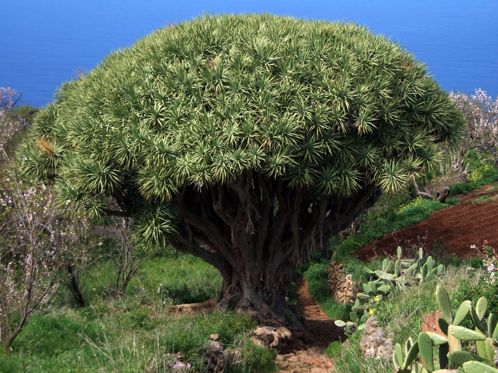 Dracaena draco near Puntagorda, La Palma